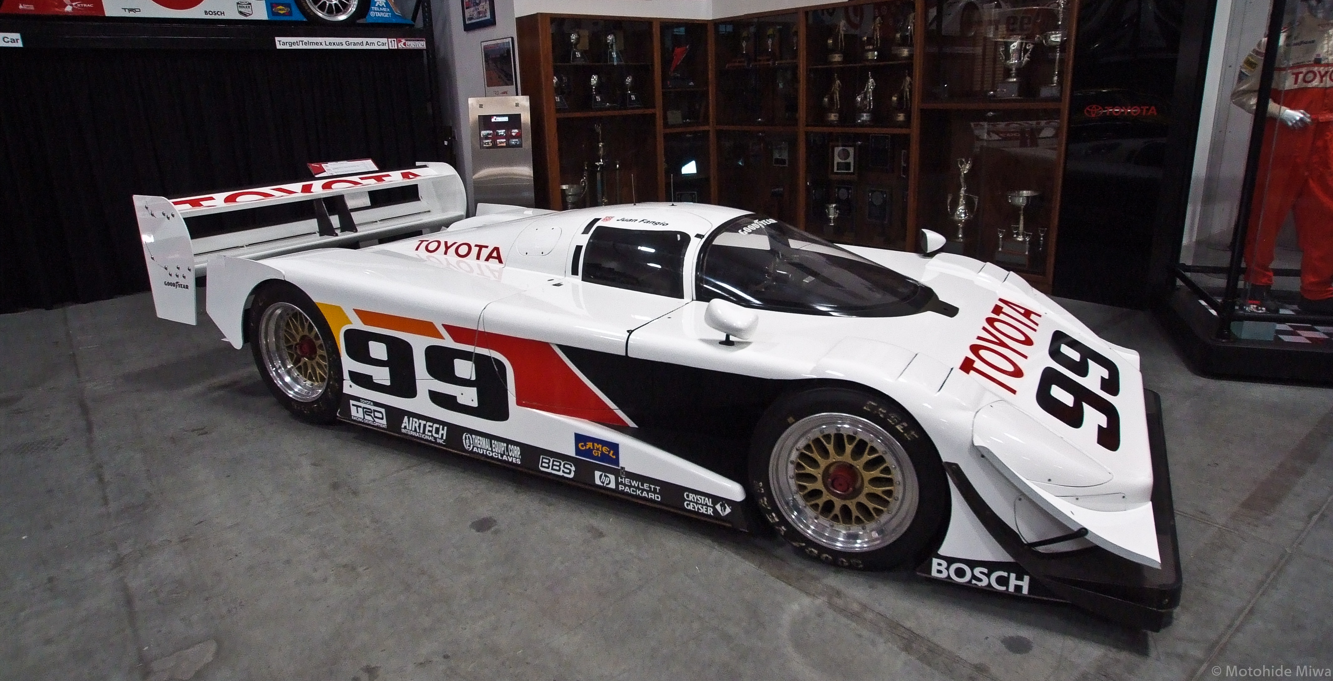 Toyota Eagle IMSA